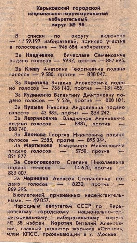 Виталий Коротич. Харьков. Результаты выборов народного депутата (одного) в Верховный Совет СССР по харьковскому городскому национально-территориальному округу 14 мая 1989 года. Огромный отрыв - в 17 раз больше голосов, чем ближайший кандидат.